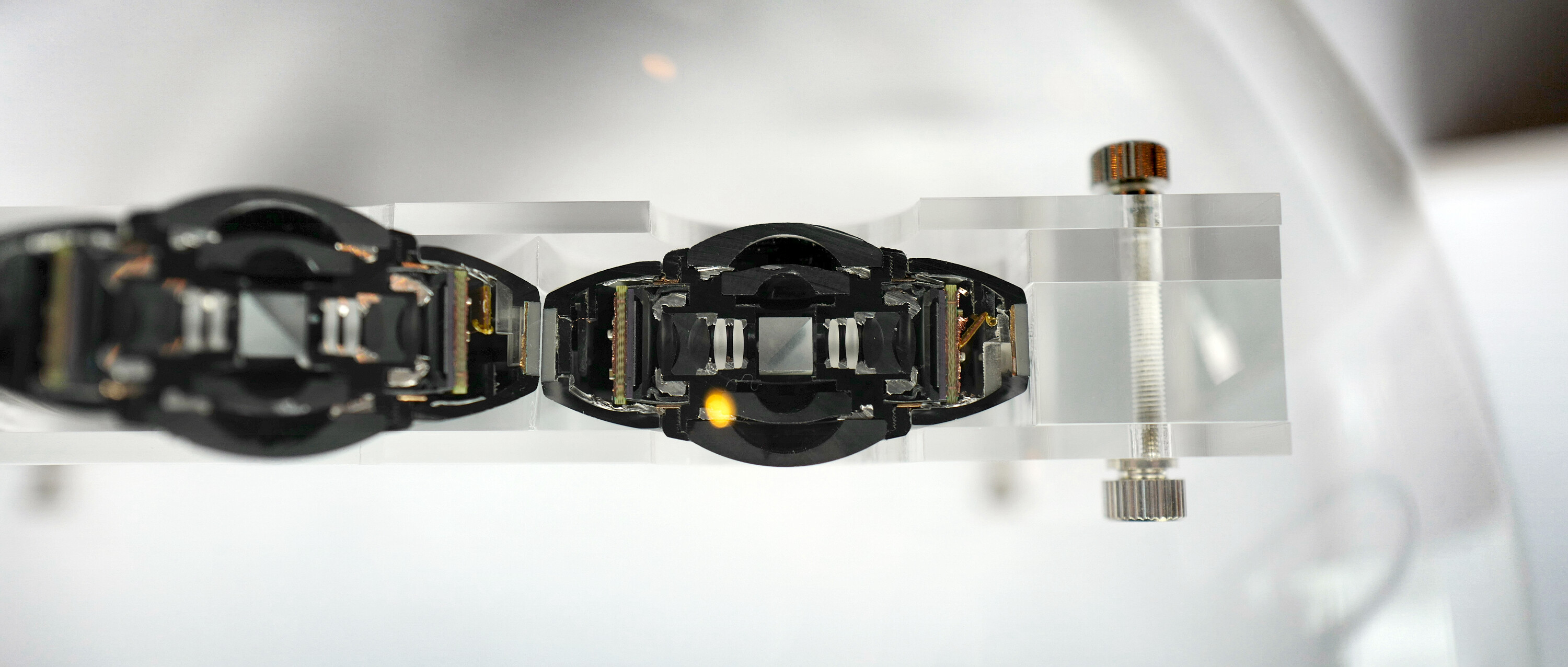 理光THETA V的镜头法线剖面，可以看到贯穿历代的屈曲光学系设计。